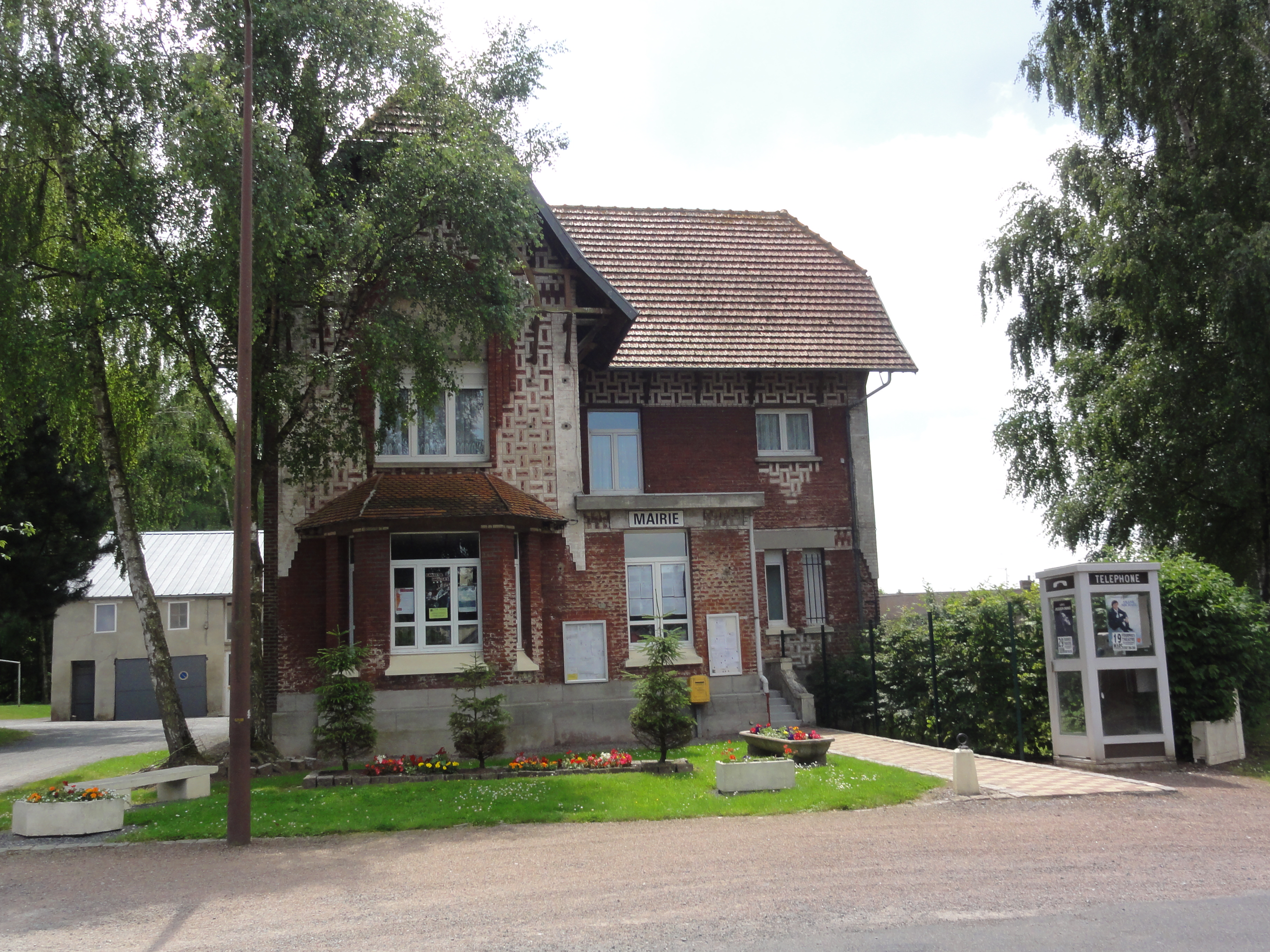 Villers-lès-Guise (Aisne) mairie